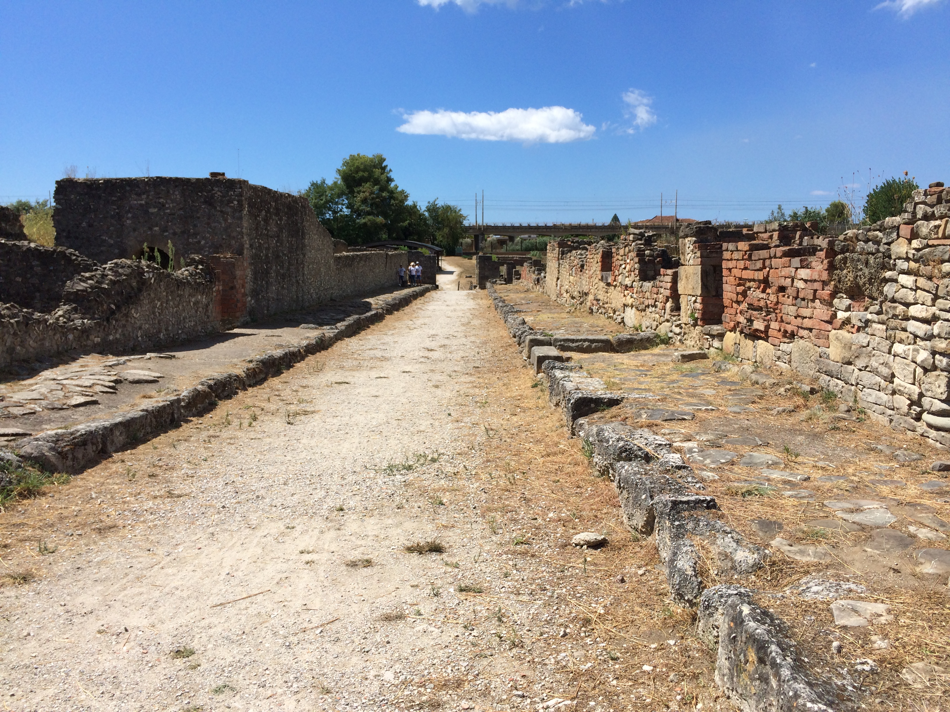 Parco archeologico di Velia This is a photo of a monument which is part of cultural heritage of Italy.